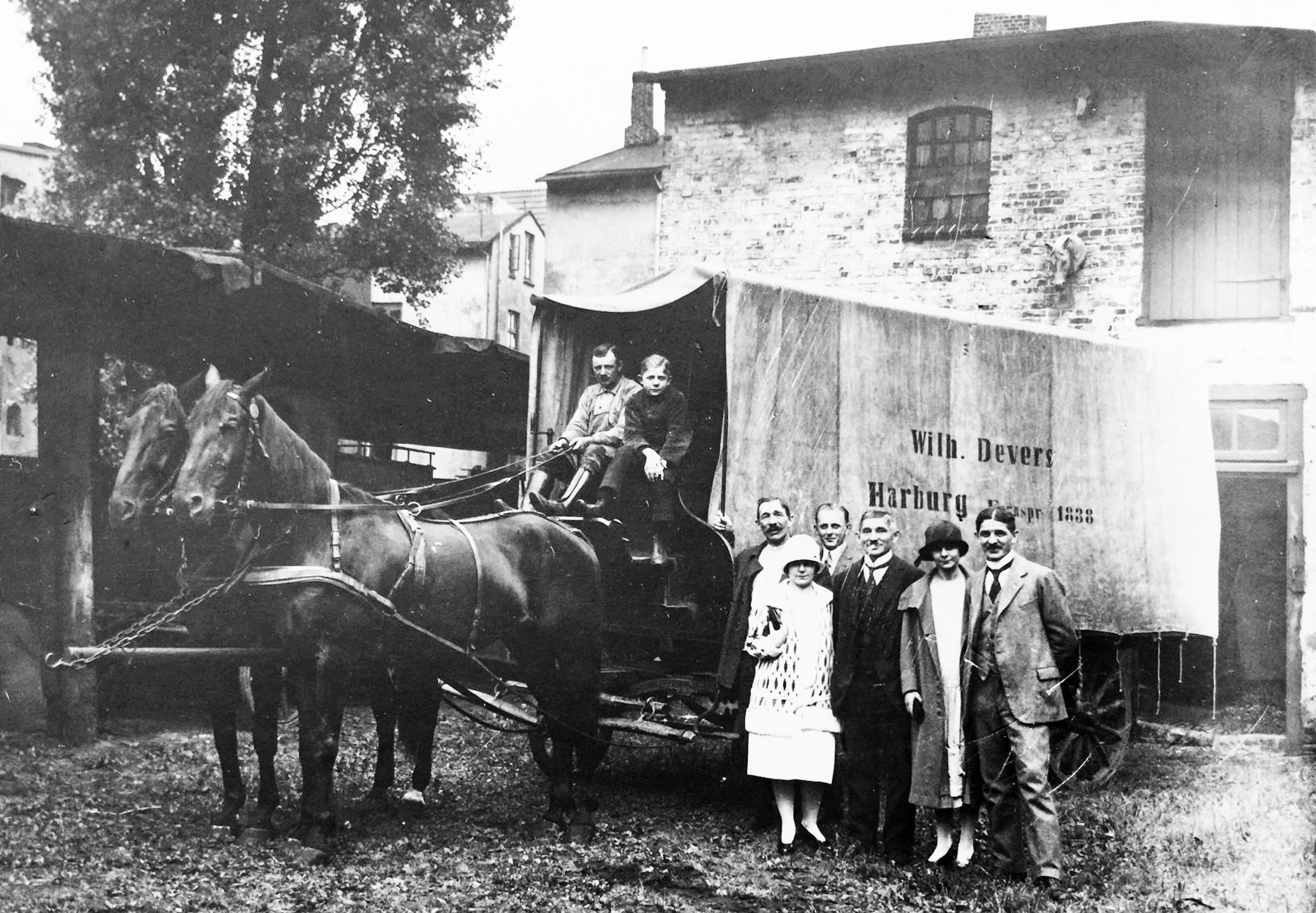 Wilhelm Devers Rollfuhrwesen Harburg von 1888